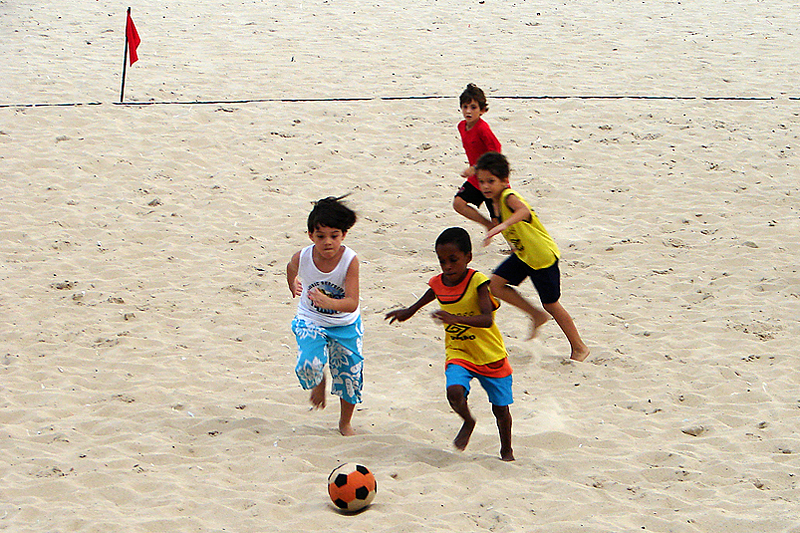 Crianças jogando futebol de areia em Ipanema, Rio de Janeiro, Brasil